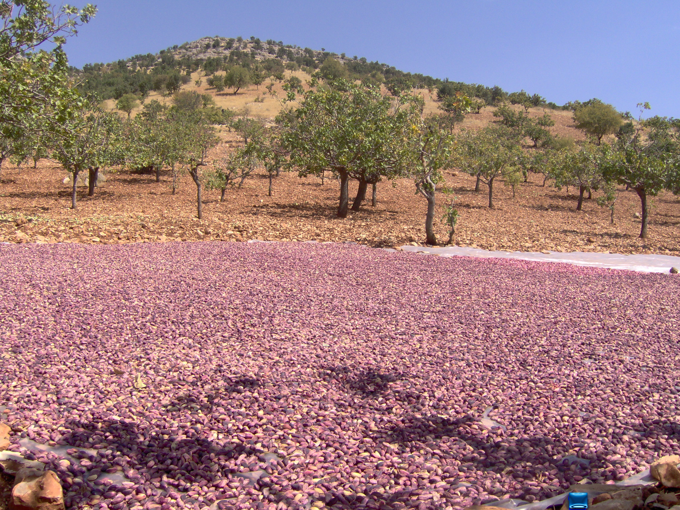 Fıstığın kurutulma aşaması